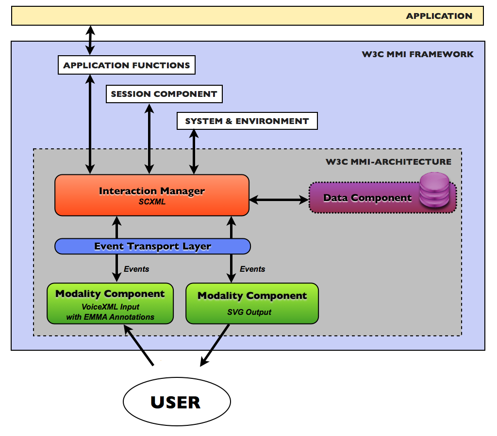 Modules MMI-Arch